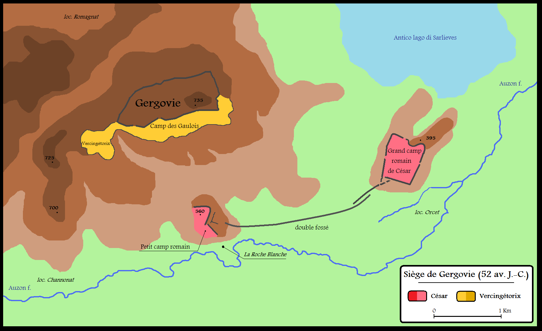 Siège de Gergovie par César contre Vercingétorix en 52 av. J.-C. (Phase 1)